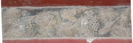 葡萄纹样 拍摄